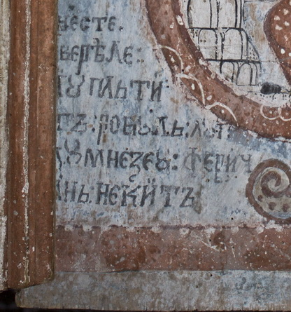 Szűz Mária-fatemplom, 18. század (Létka)